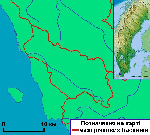 Карта річки Роон на півдні Швеції у лені Сконе. Створено на основі карти річок лену Сконе Skåne län на сайті SMHI Шведського інституту метеорології та гідрології. Використано карту File:Sweden relief location map.jpg.